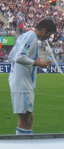 Bostjan Cesar lors du match OM-Lille du 29 octobre 2005.